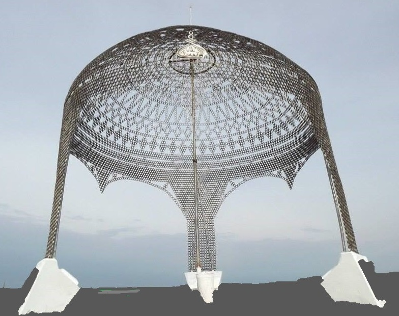 Пермский край. Башкултай. Памятник "Шлем батыра". Авт. Мурзакаев А.С.